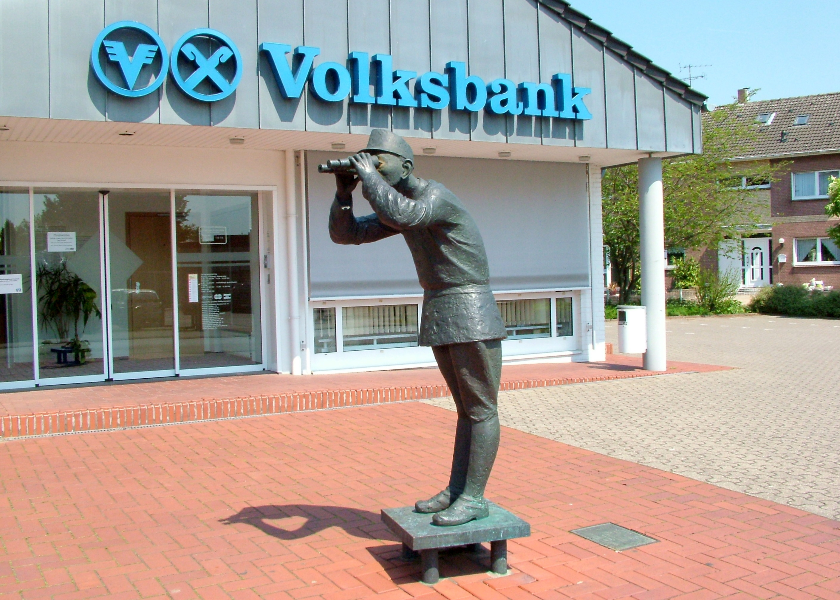 Statue Zöllner, Suderwick